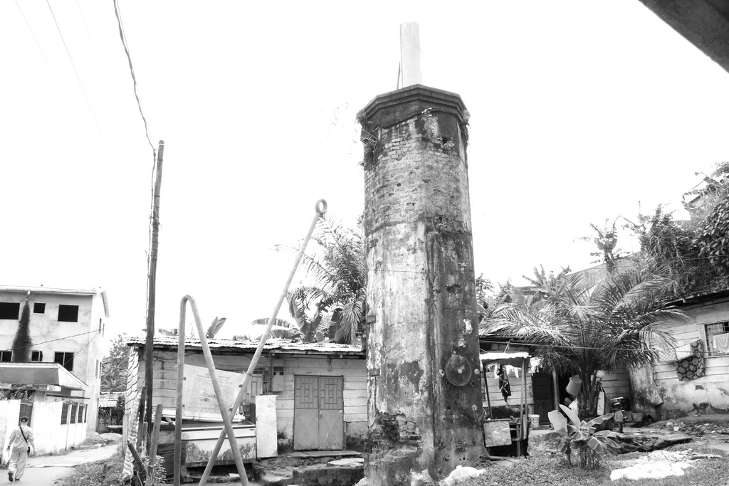 Bonakouamouang Chimney in Douala, Cameroon. SUD Salon Urbain de Douala 2010